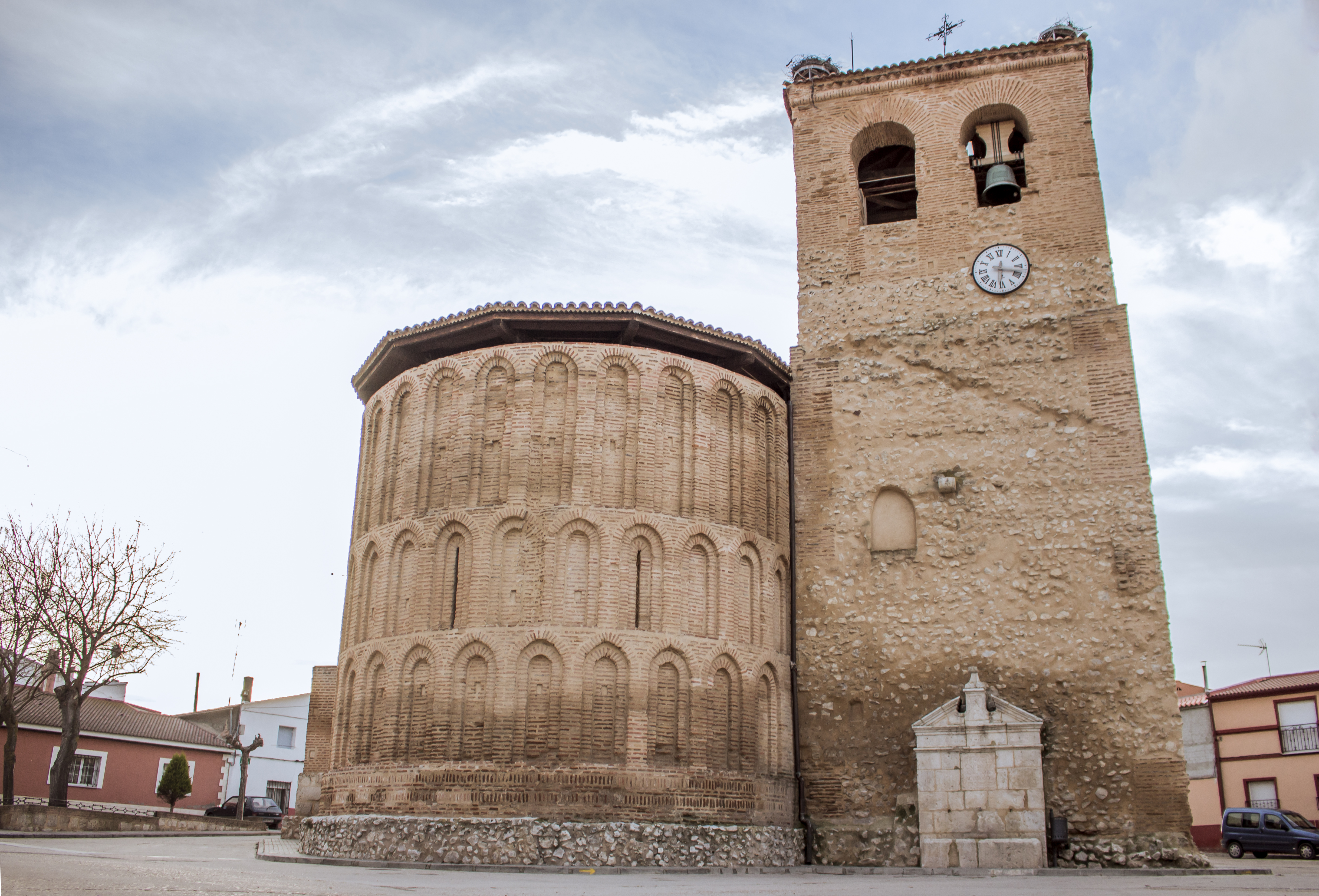 Iglesia de Santiago Apóstol en Alcazarén. Fotografía tomada con Canon EOS 700D, objetivo 18-55 IS II STM